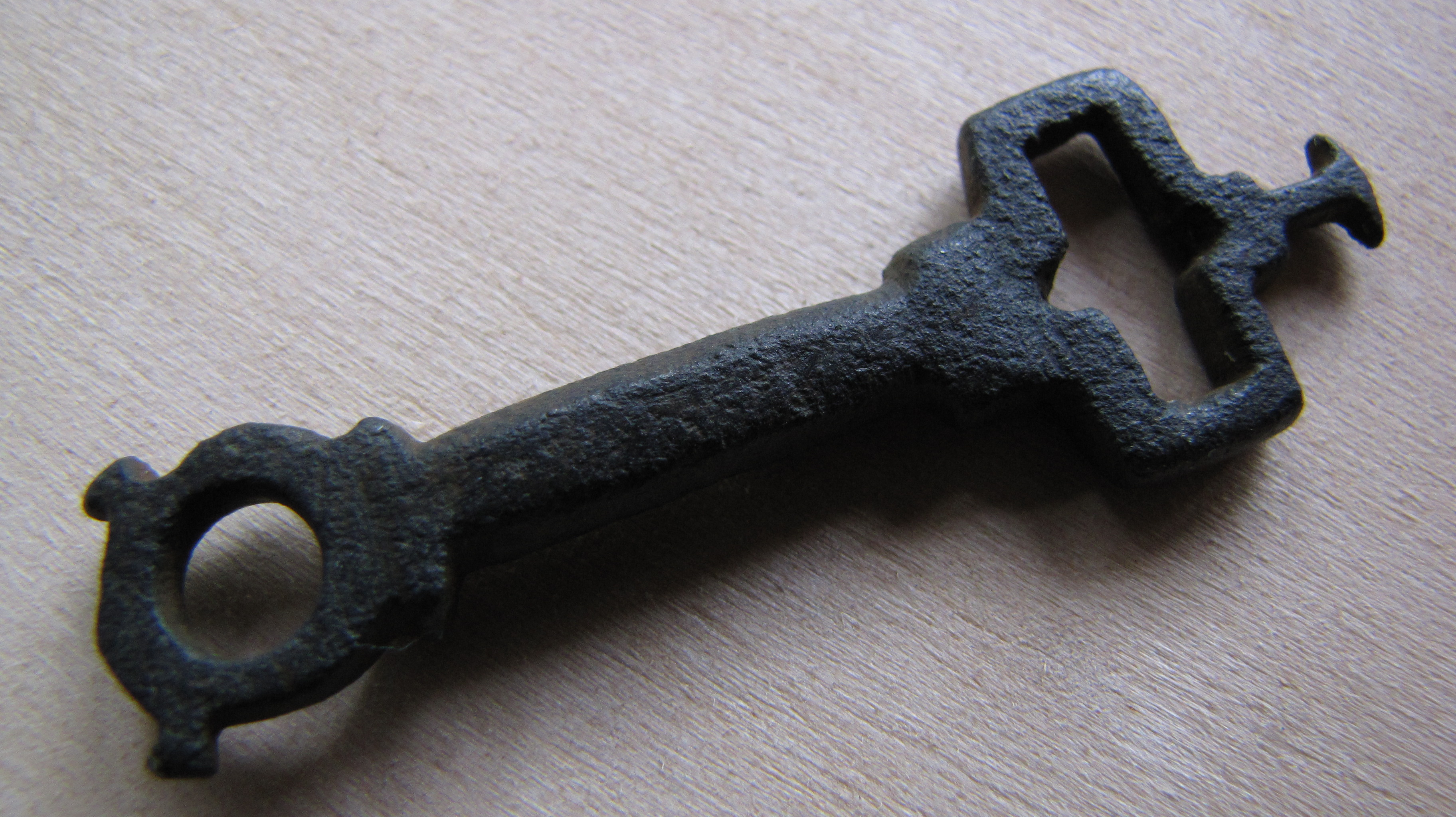 Voided Anglo-Viking key (c. 900AD)